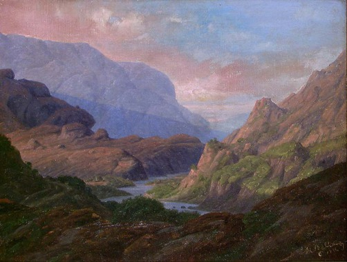 Norwegian: Fjellandskap.title QS:P1476,no:"Fjellandskap." label QS:Lno,"Fjellandskap."